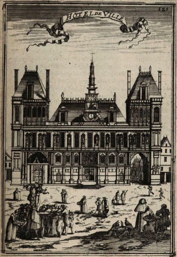 "Hôtel de Ville [de Paris]" (planche 81)